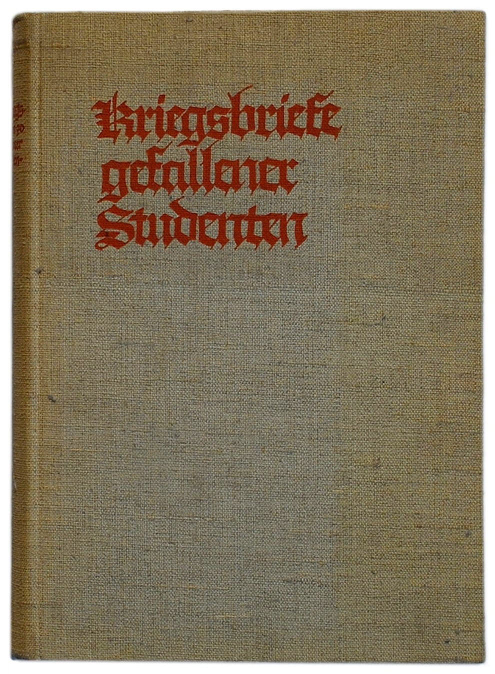 Witkop, Philipp: Kriegsbriefe gefallener Studenten. In Verbindung mit den Deutschen Unterrichts-Ministerien herausgegeben. München: G. Müller 1928, 5. erweiterte Auflage, 354 Seiten + 3 nicht paginierte Blatt. Original-Verlagseinband, Ganzleinen großes Oktav (24 x 18 cm).